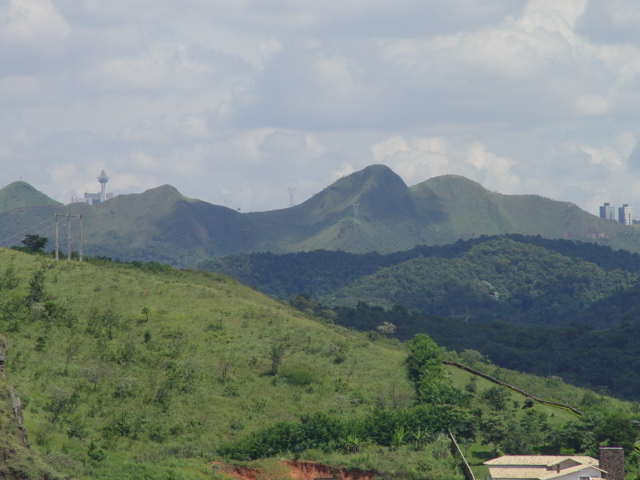 Nova Lima (MG), Brazil - Vista parcial da Mata do Jambreiro / partial view of the Jambreiro Woods